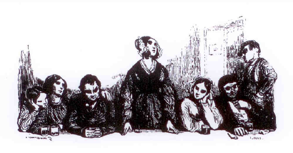 Groupe de goguettiers